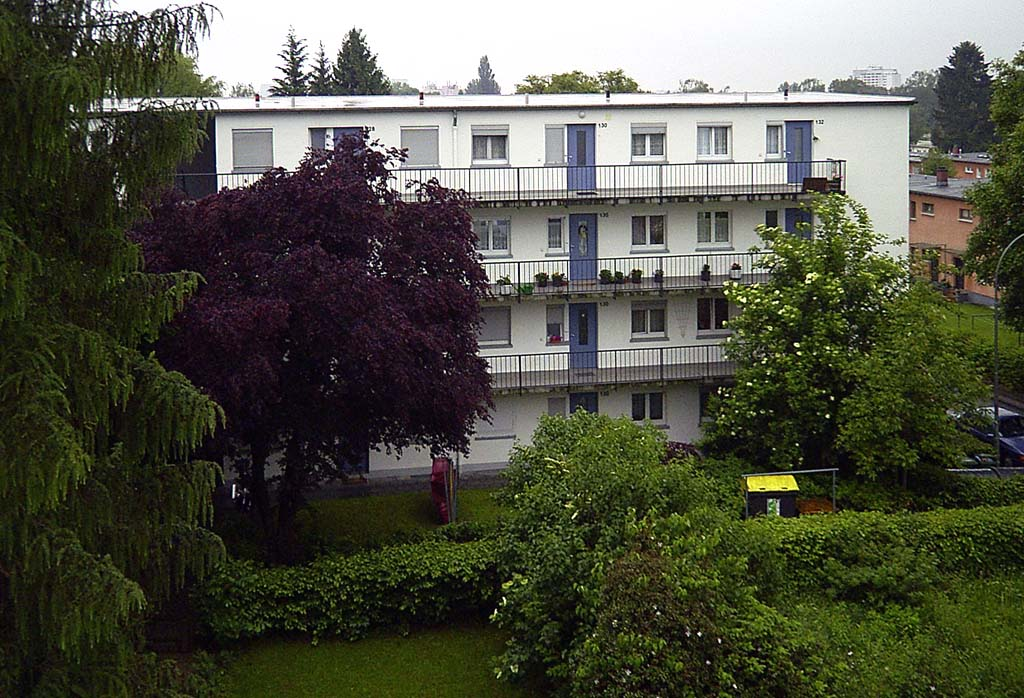 Frankfurt Westhausen - Laubenganghaus, Architekten Ferdinand Kramer and Eugen Blanck.